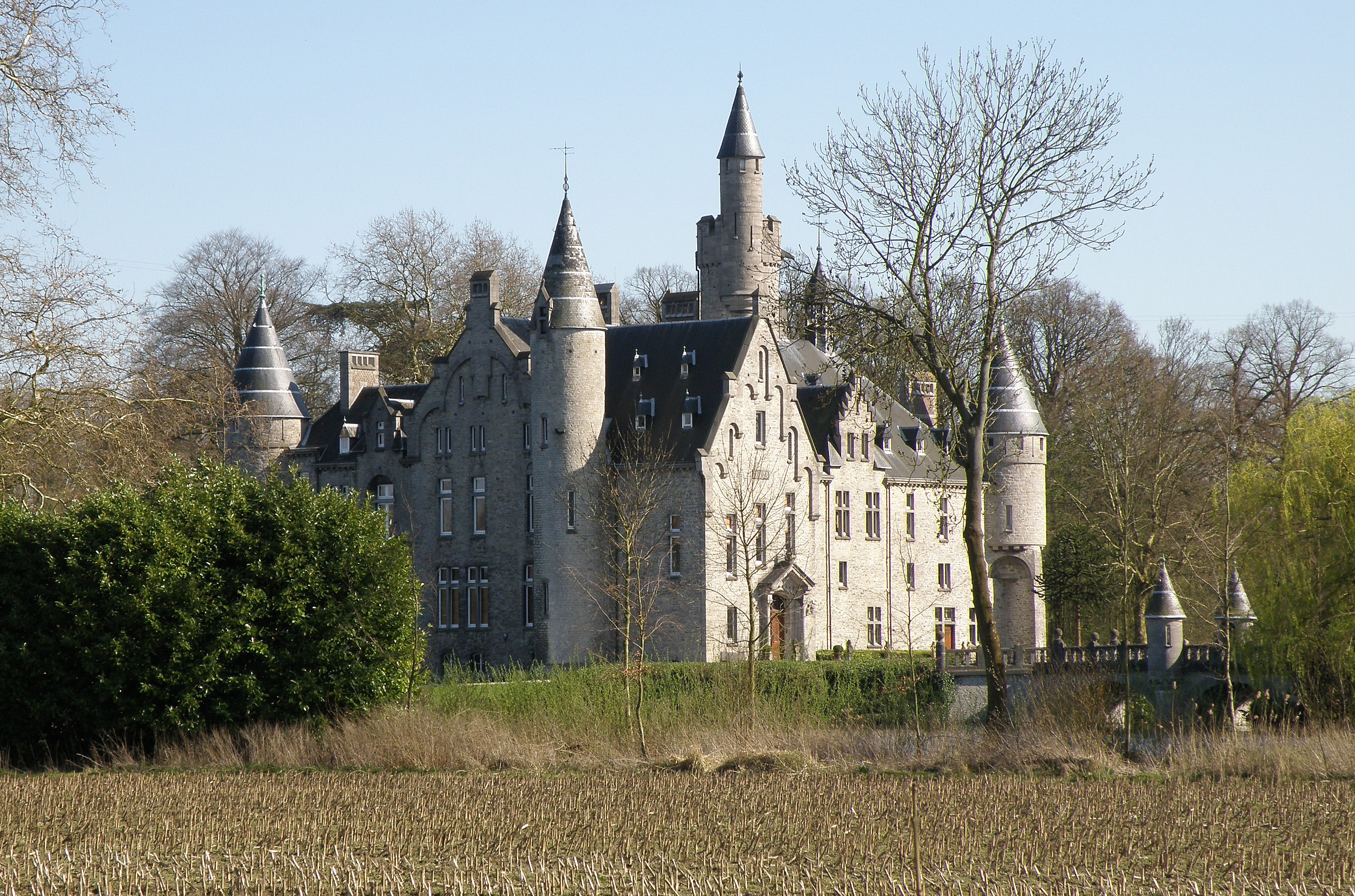 Bornem, prov. Antwerpen (België). Noordgevel van het Kasteel de Marnix de Sainte-Aldegonde, arch. H. Beyaert (voltooid 1894). Brug met ronde torentjes door arch. Janlet (1895).